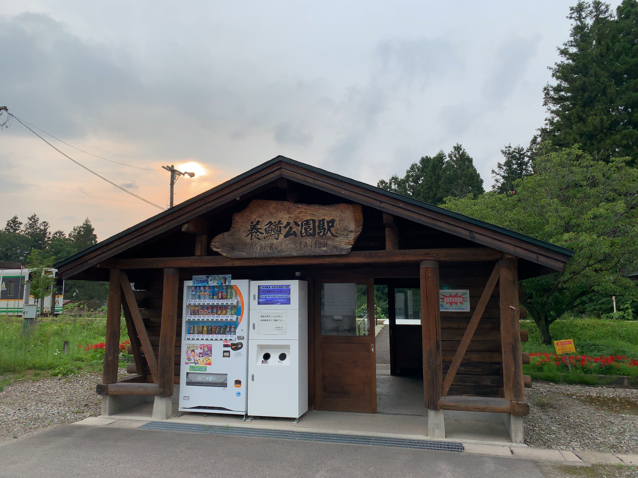 会津鉄道 養鱒公園駅 駅舎